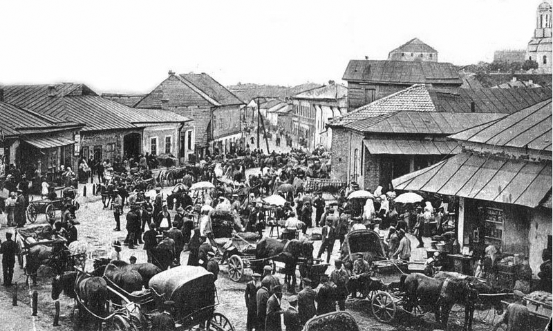 Ринок в Острозі.